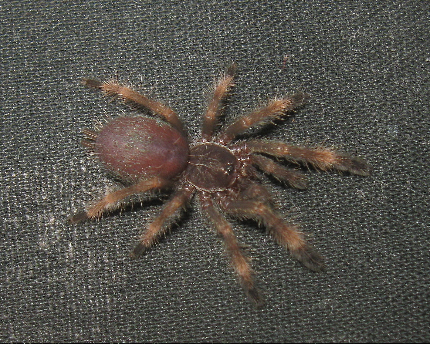 Psalmopoeus reduncus 1 vedléses madárpók